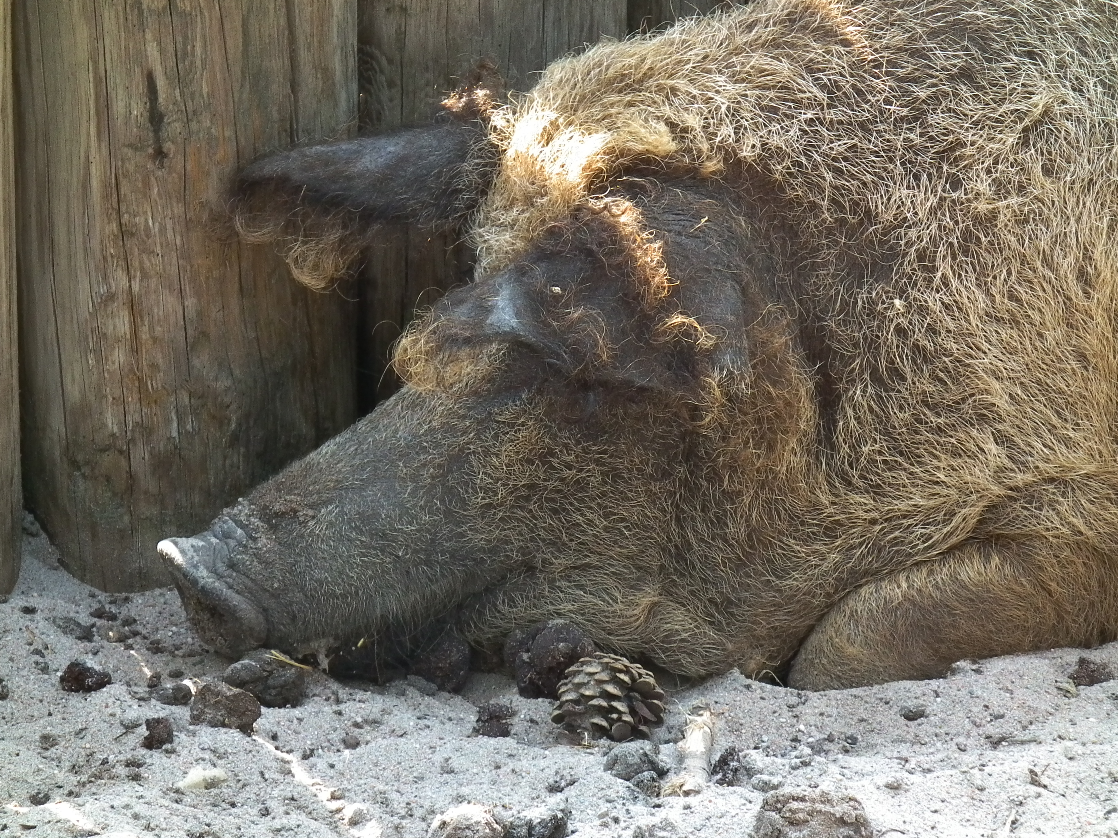 Magalitza-Schwein (Wollschwein), fotografiert im Herzogenriedpark in Mannheim (Baden-Württemberg, Deutschland)